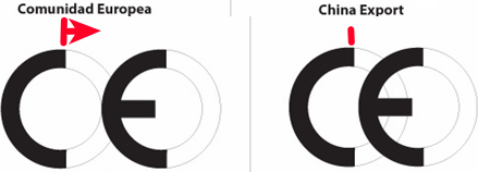 logos CE vs China Export